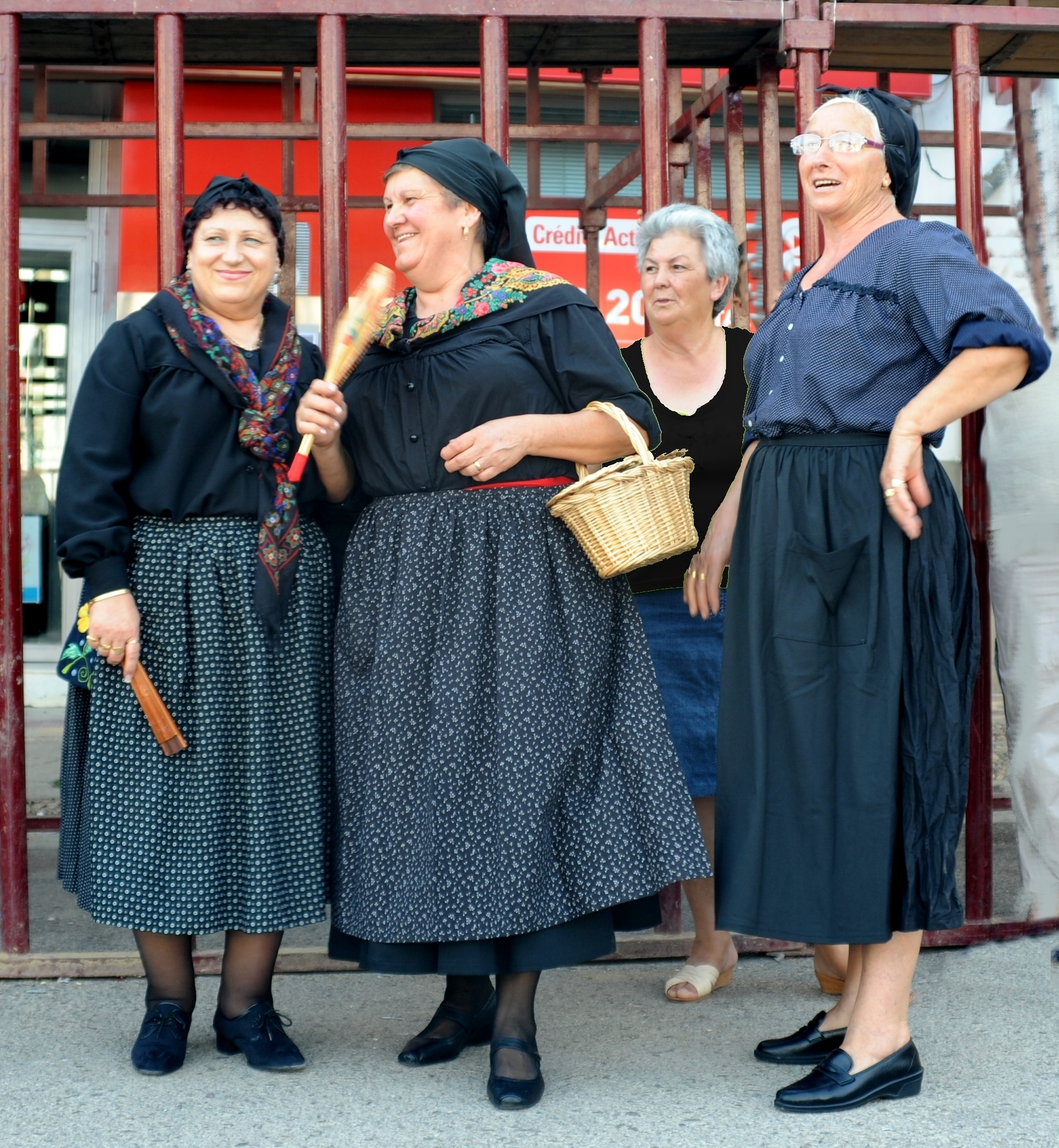 Día del Habla en Serradilla (Cáceres)